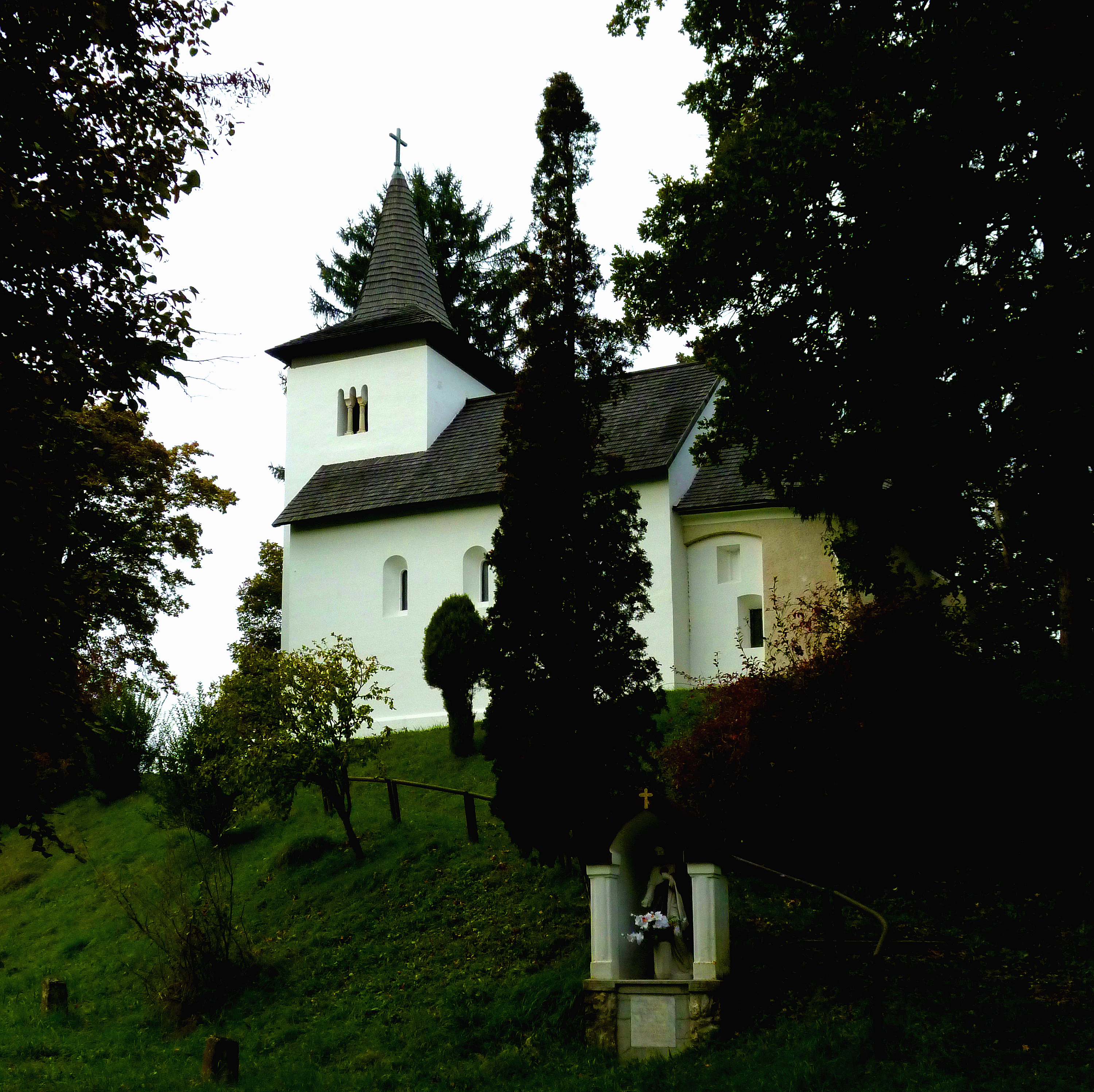 Római katolikus templom (Böde-Zalaszentmihályfa)